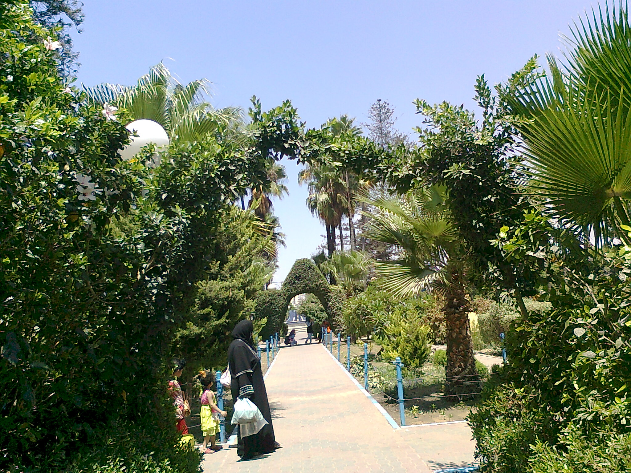 Gaza Park - منتزه بلدية غزة